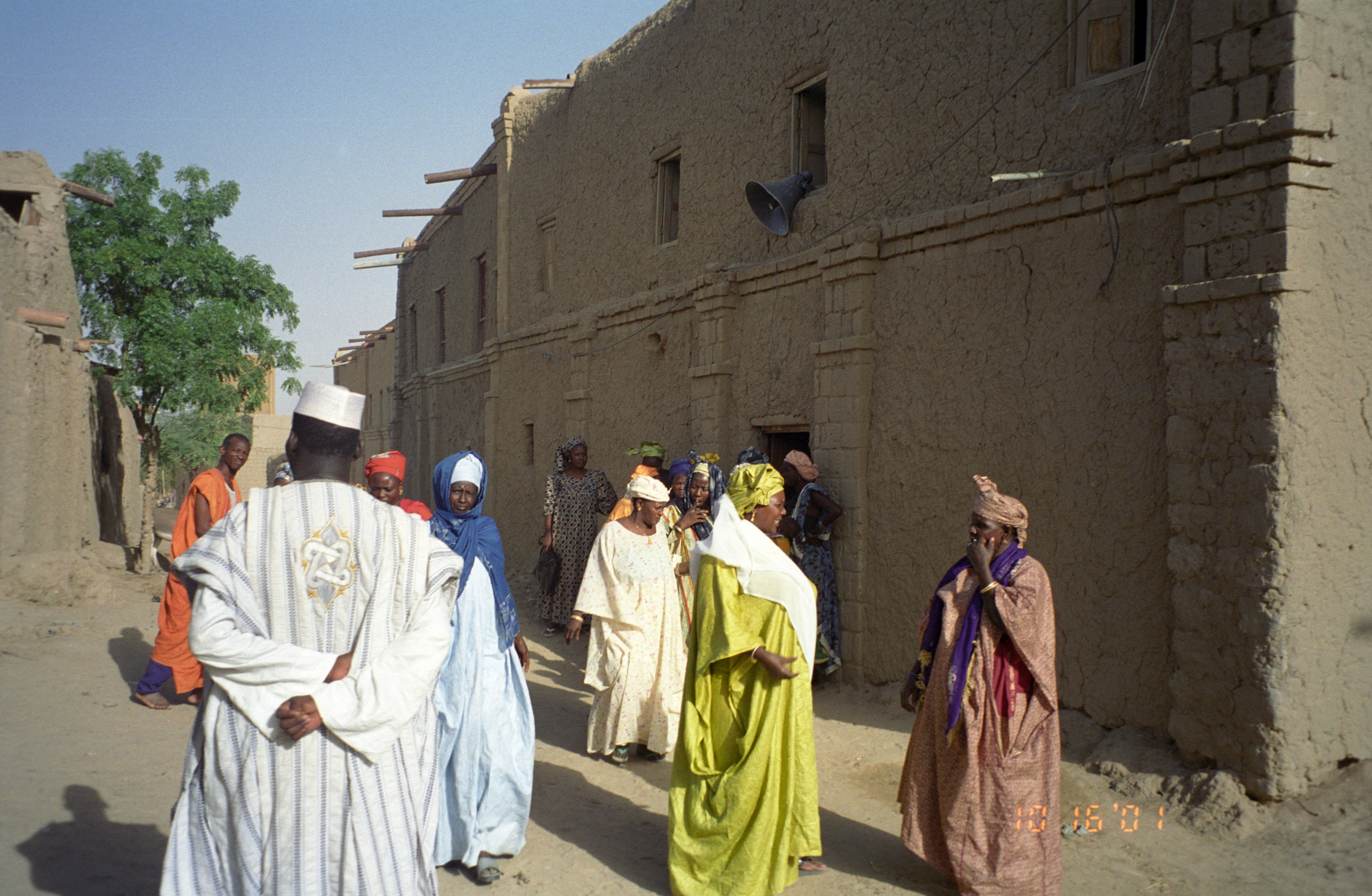 Timbuktu Wedding Party